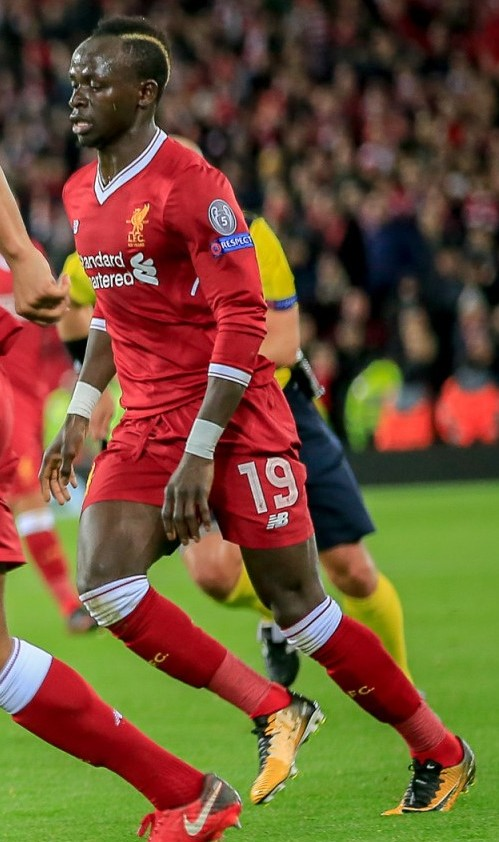 Roman Zobnin, Sadio Mané